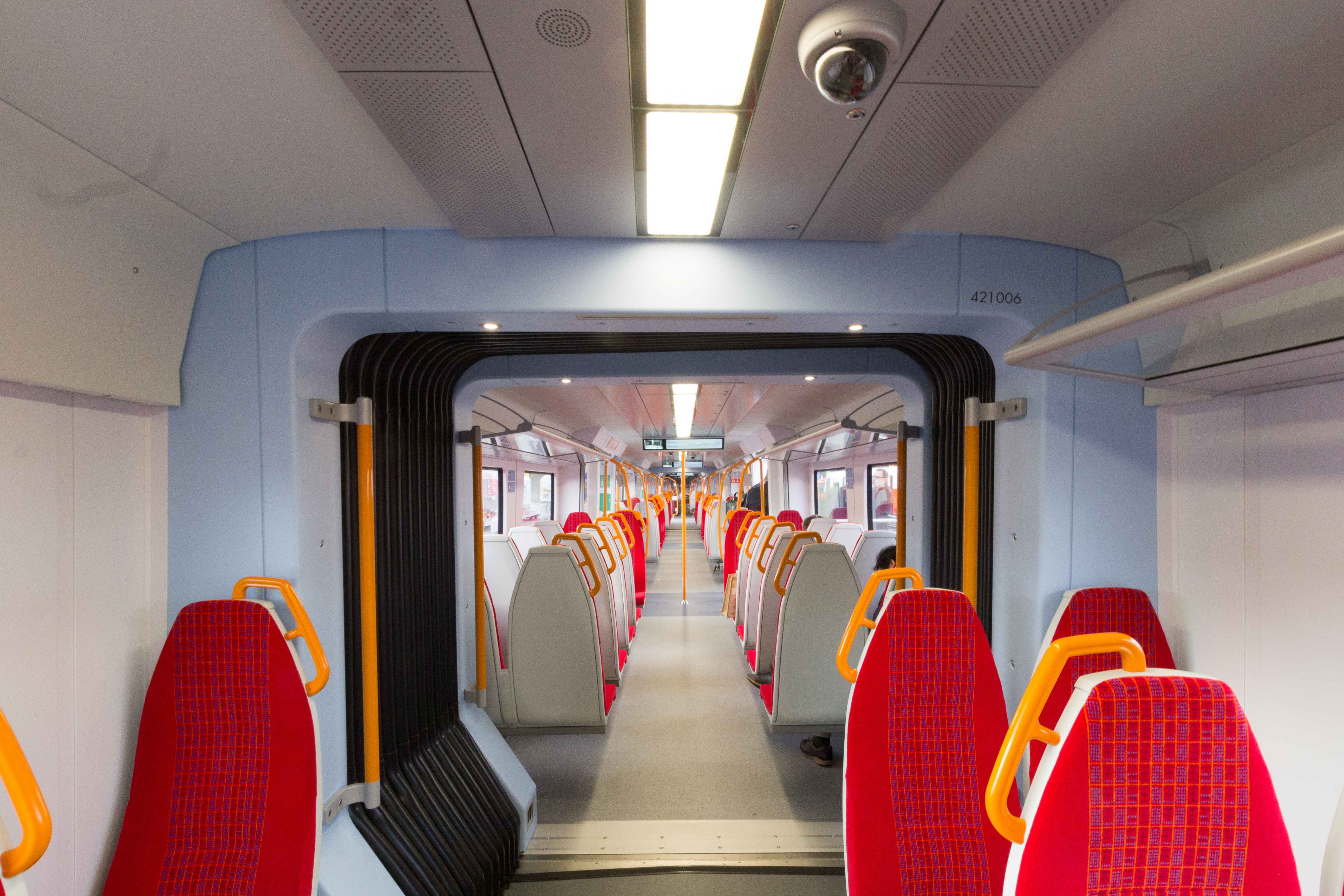 British Rail Class 707s of South West Trains - innoTrans 2016